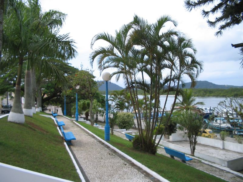 Paranaguá, Paraná. Ido: Paranaguá.